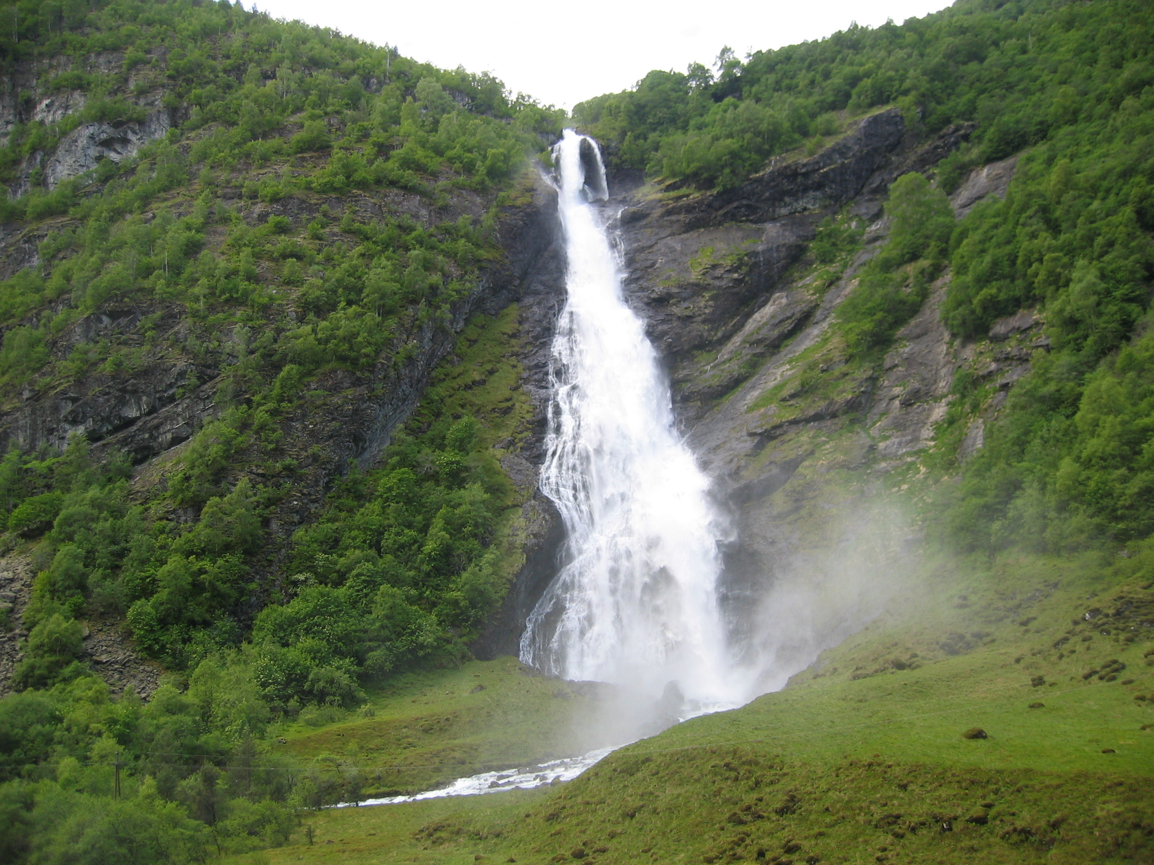 Avdalsfossen